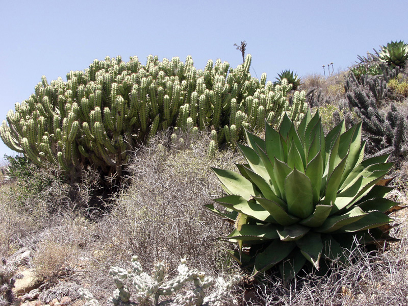 Myrtillocactus cochal, Baja California desert, Mexico